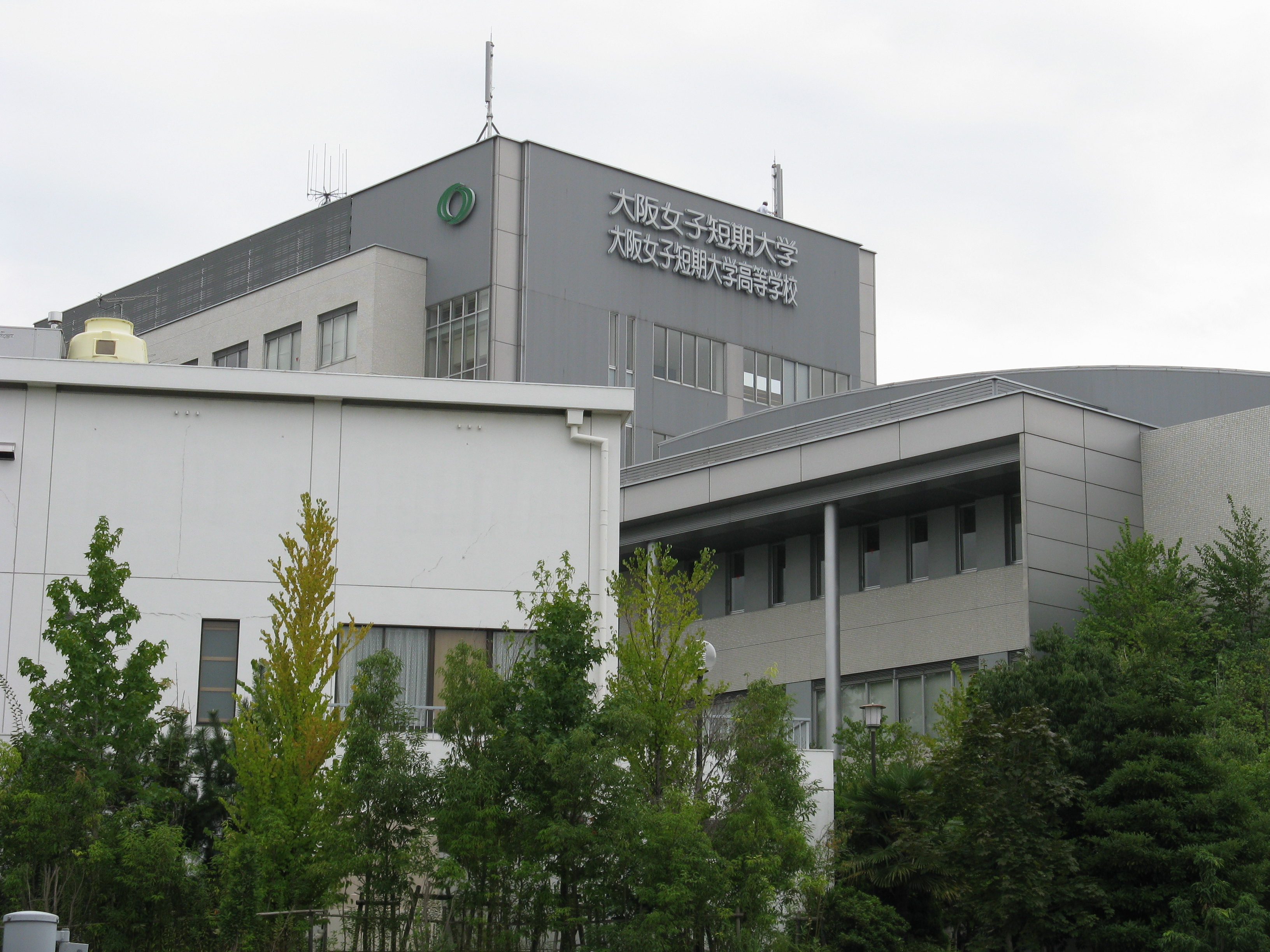 大阪女子短期大学・大阪女子短期大学高等学校